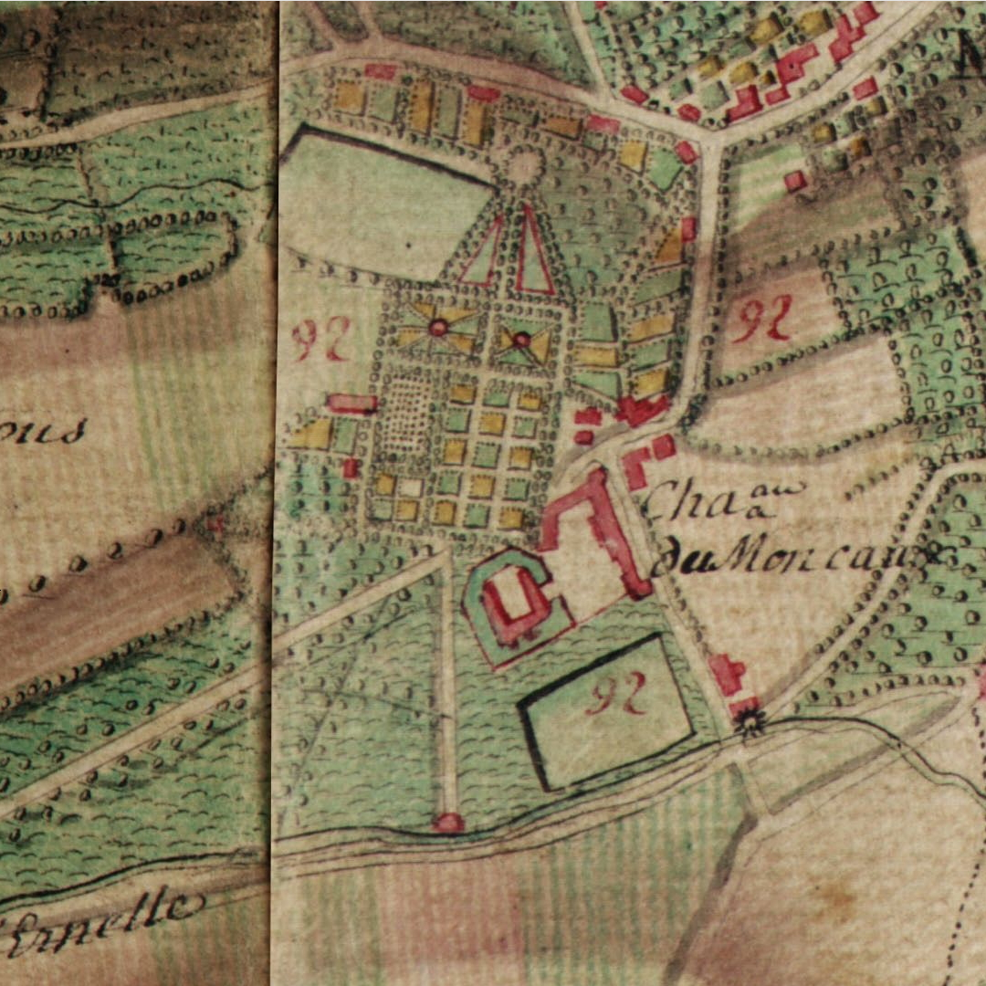 Château de Monceau-sur-Sambre (Charleroi - Belgique) Carte de Cabinet des Pays-Bas autrichiens La carte de Cabinet des Pays-Bas autrichiens a été levée sous la direction du comte de Ferraris entre 1770 et 1777. Il s'agit d'un document militaire réalisé en trois exemplaires et dont l'échelle originale est 1 / 11 520. La carte est entièrement manuscrite et procède de levers sur le terrain.